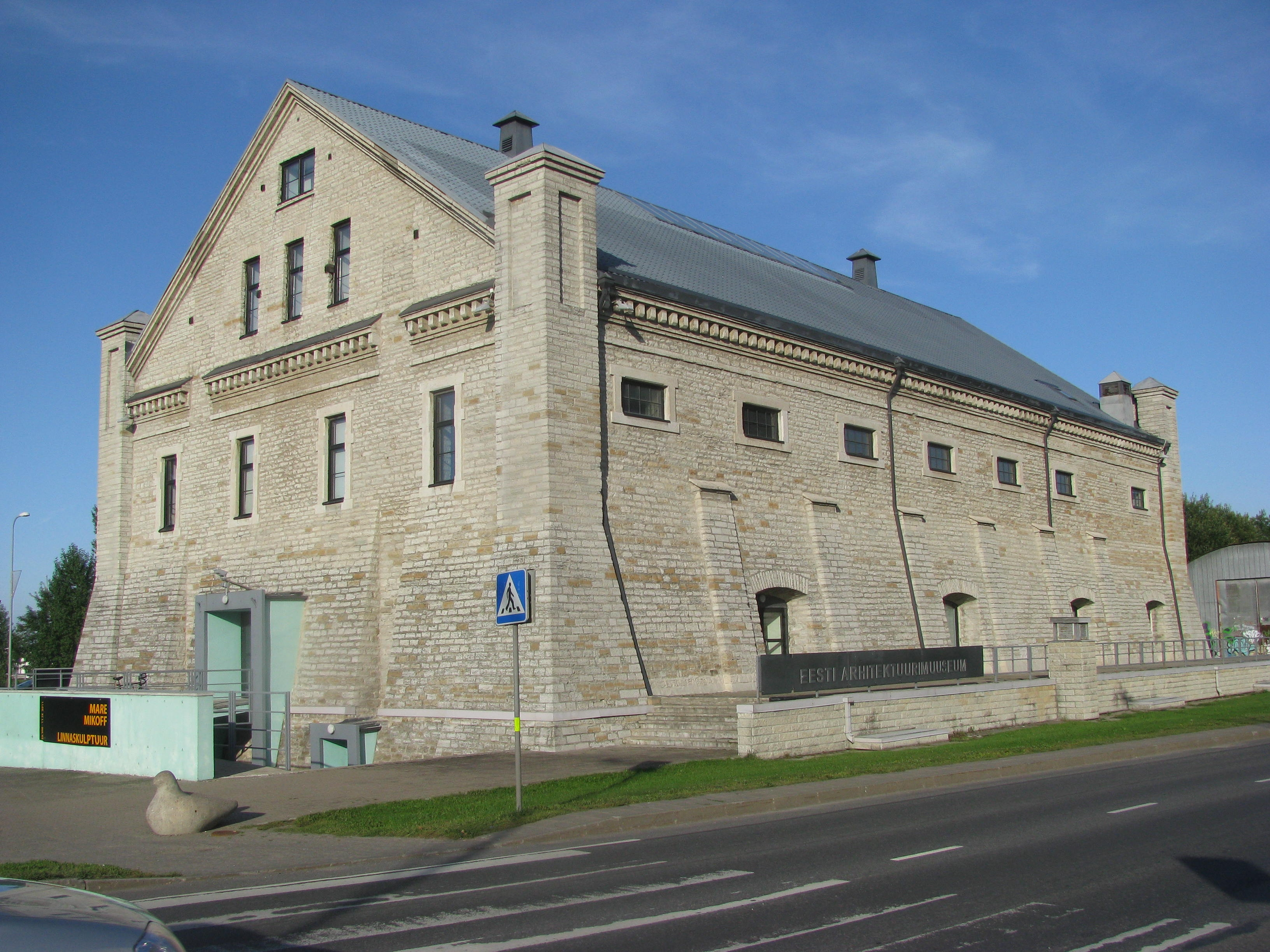 Eesti Arhitektuurimuuseum (Rotermanni soolaladu).